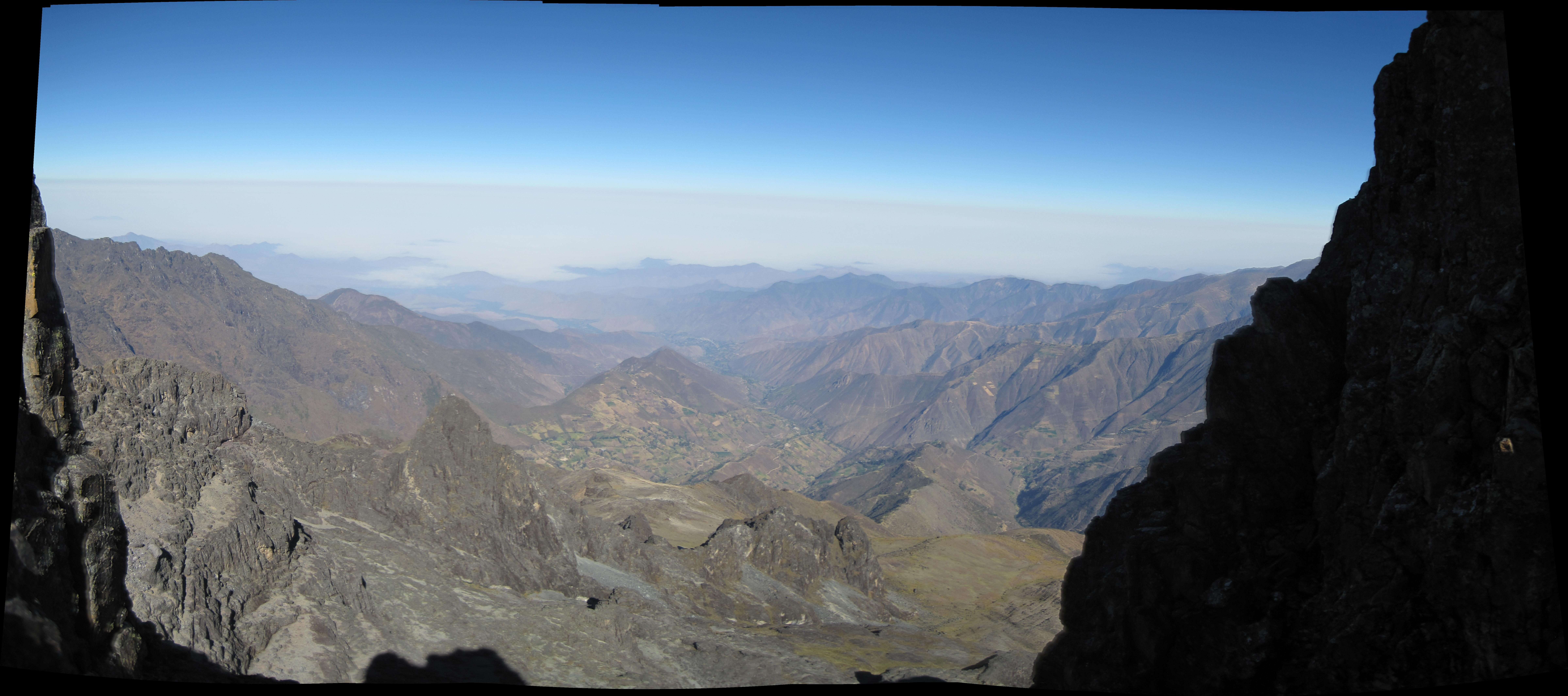 Panorámica de los tramos medio y alto de la Cuenca del río Nepeña, tomada desde la cabecera de cuenca a 5070 m de altitud.